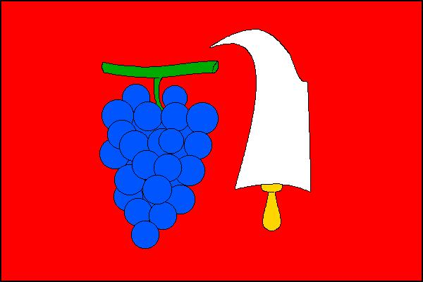 Vlajka obce Němčičky